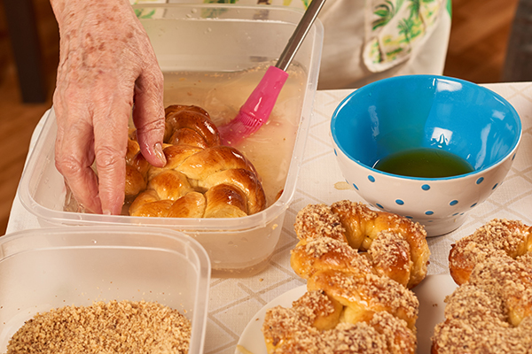 Pregatirea unor mucenici gustosi, pufosi si aromati, impartasita de o bunica din Moldova.